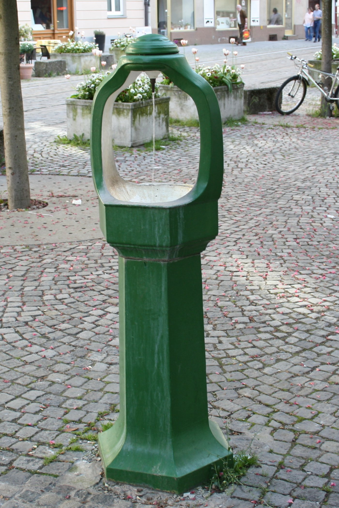 Trinkbrunnen von Wilhelm Bertsch, Genoveva-Schauer-Platz, München